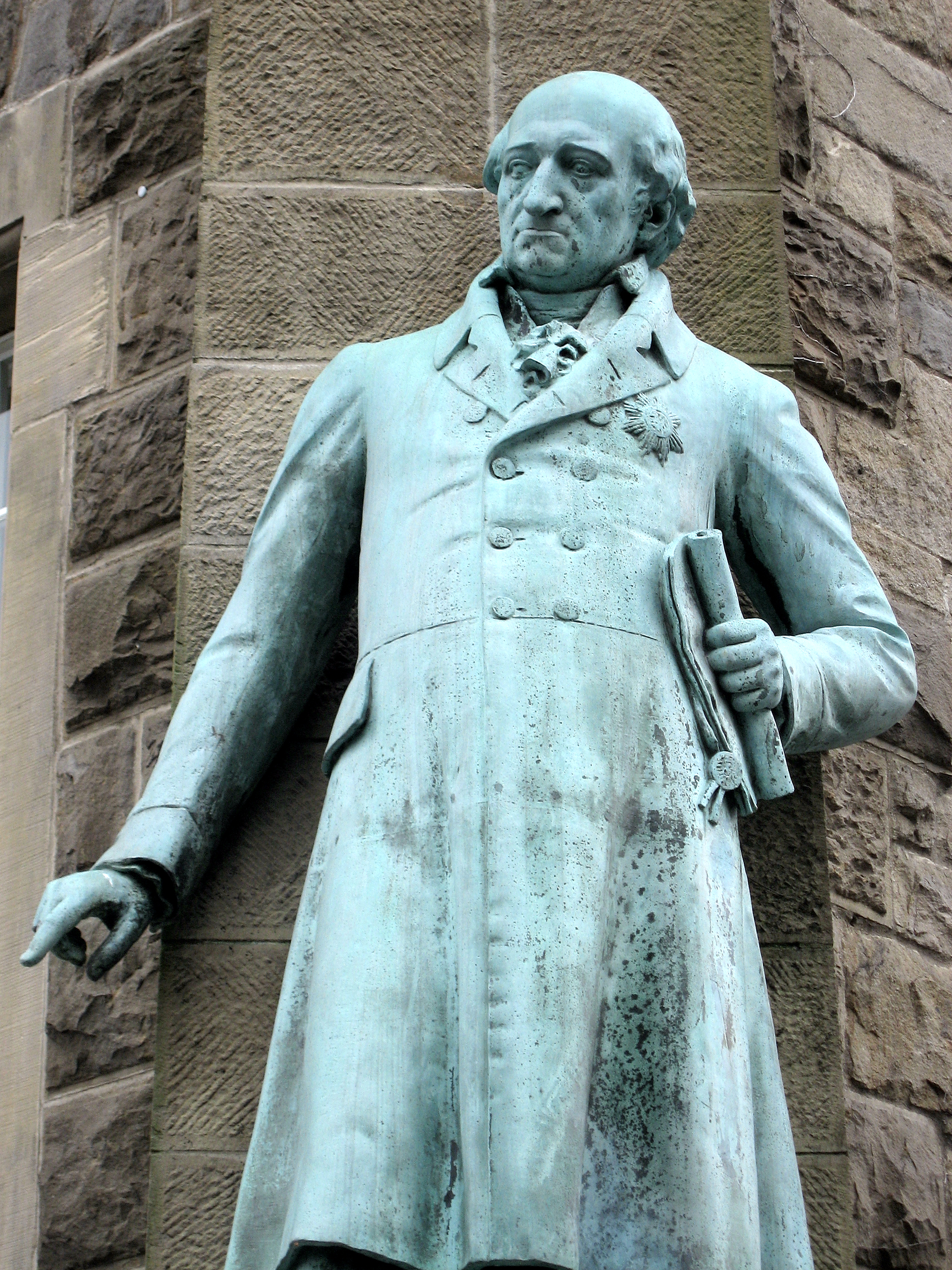 Rathaus Wetter, Statue Freiherr vom Stein am Rathaus